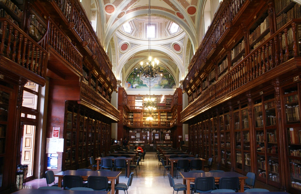 Biblioteca Pública de la Universidad Michoacana ubicada en Av. Madero Poniente esquina con Nigromante, Centro Histórico de Morelia, Michoacán, México. Fundada en 1930, conserva un fondo bibliográfico antiguo de 22,901 volúmenes, que van desde el siglo XV hasta principios del siglo XX. El edificio donde tiene su sede la biblioteca fue un templo de los Jesuitas durante la época del Virreinato de la Nueva España, construido en el siglo XVII en estilo barroco. En su interior la biblioteca conserva murales al fresco pintado a mediados del siglo XX por los artistas estadounidenses Hollis Howard Holbrook, S. C. Schoneberg y R. Hansen así como del mexicano Antonio Silva Díaz.